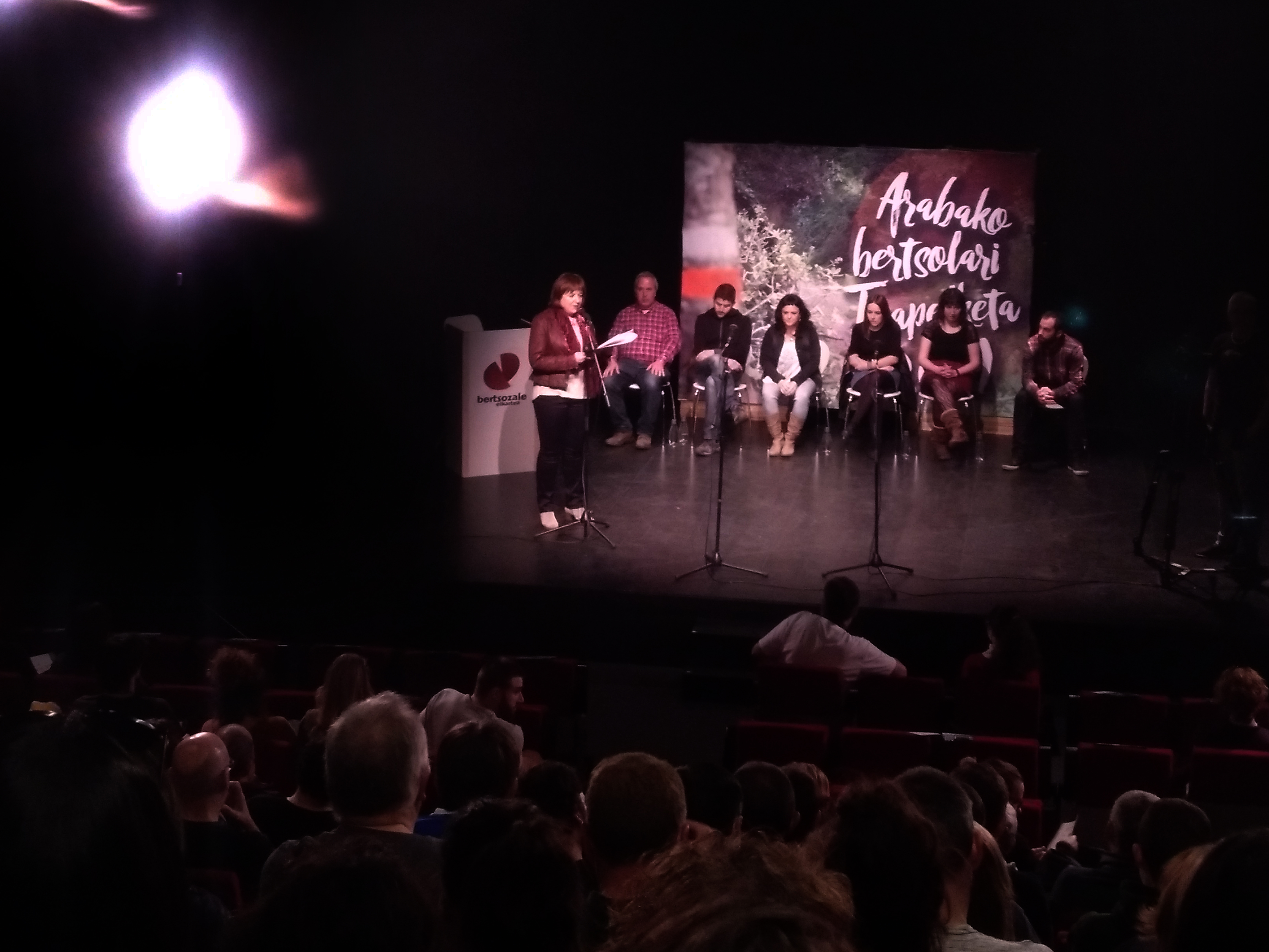 Arabako Bertsolari Txapelketaren finalerdia 2019an Dulantzin